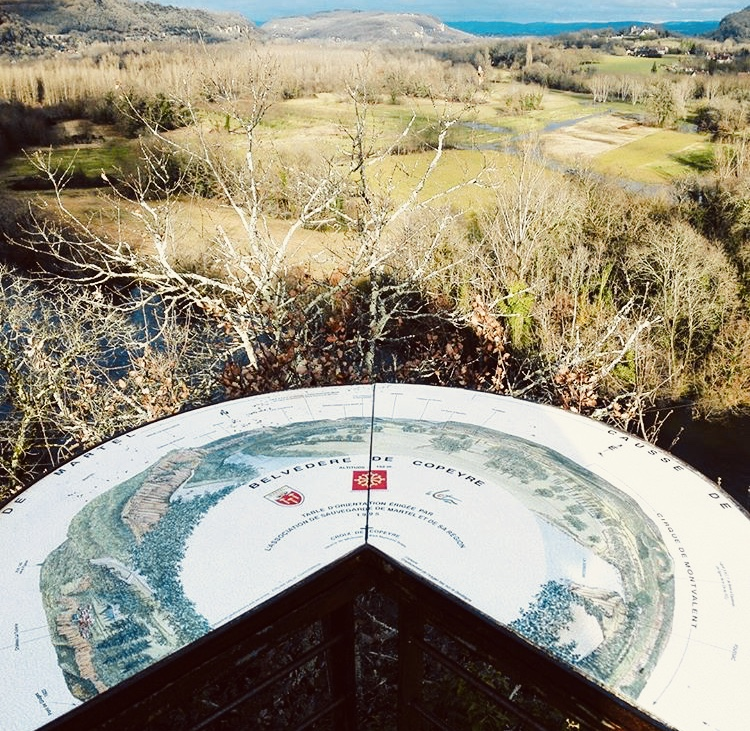 Belvédère de Copeyre - Table d'orientation © PY Redon Nouvelle table d'orientation donnant sur la vallée de la Dordogne en en lave émaillée de Volvic mise en place par Jean Redon et la Sauvegarde de Martel.